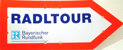 Wegweiser wie er vom ADFC bei der BR-Radltour angebracht wird